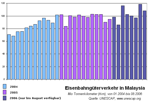 Monatliche Entwicklung des Eisenbahngüterverkehrs in Malaysia, 2004-2006 in tkm.